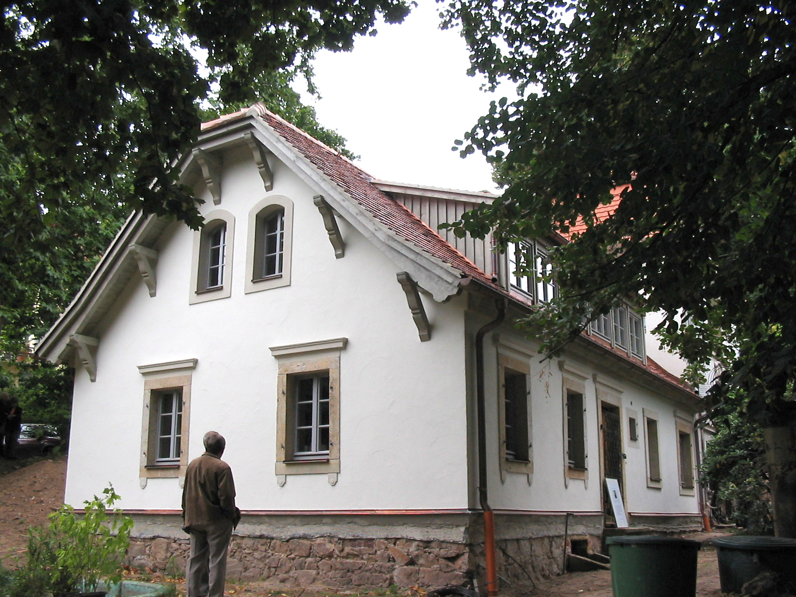 Donadini-Haus, Ursprungsgebäude am Tag des offenen Denkmals